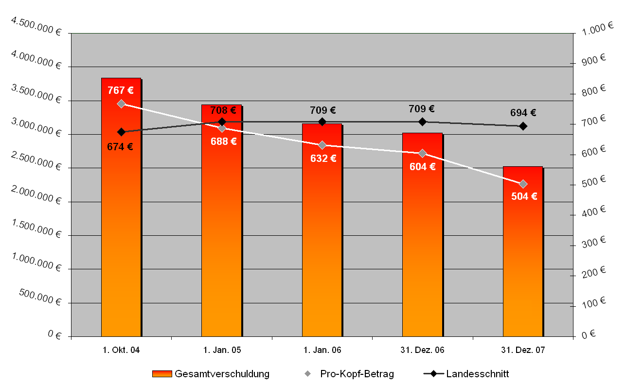 Verschuldung Niedernbergs über die letzten Jahre